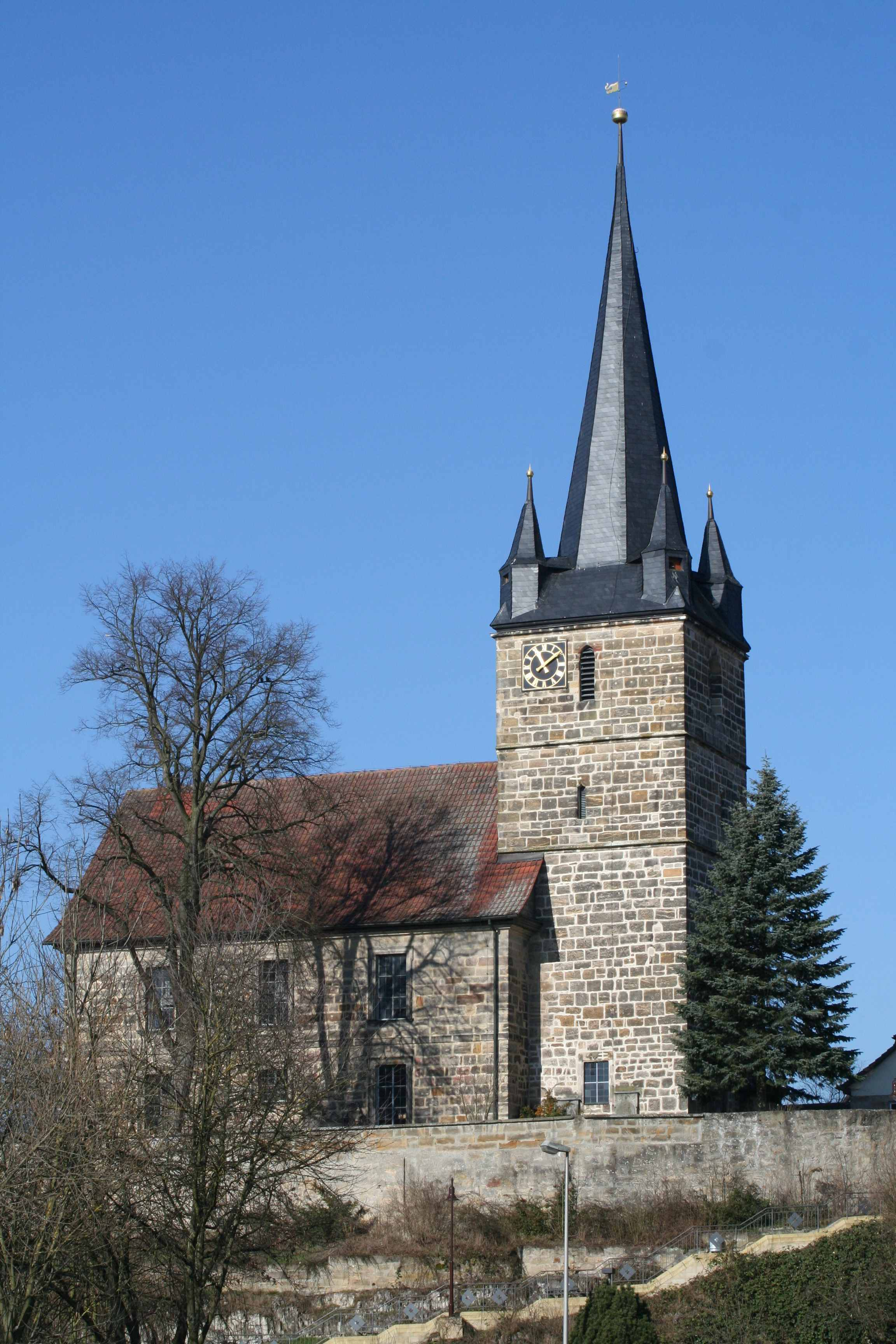 ev. Kirche Scherneck evangelische Kirche in Scherneck, Gemeinde Untersiemau, Landkreis Coburg